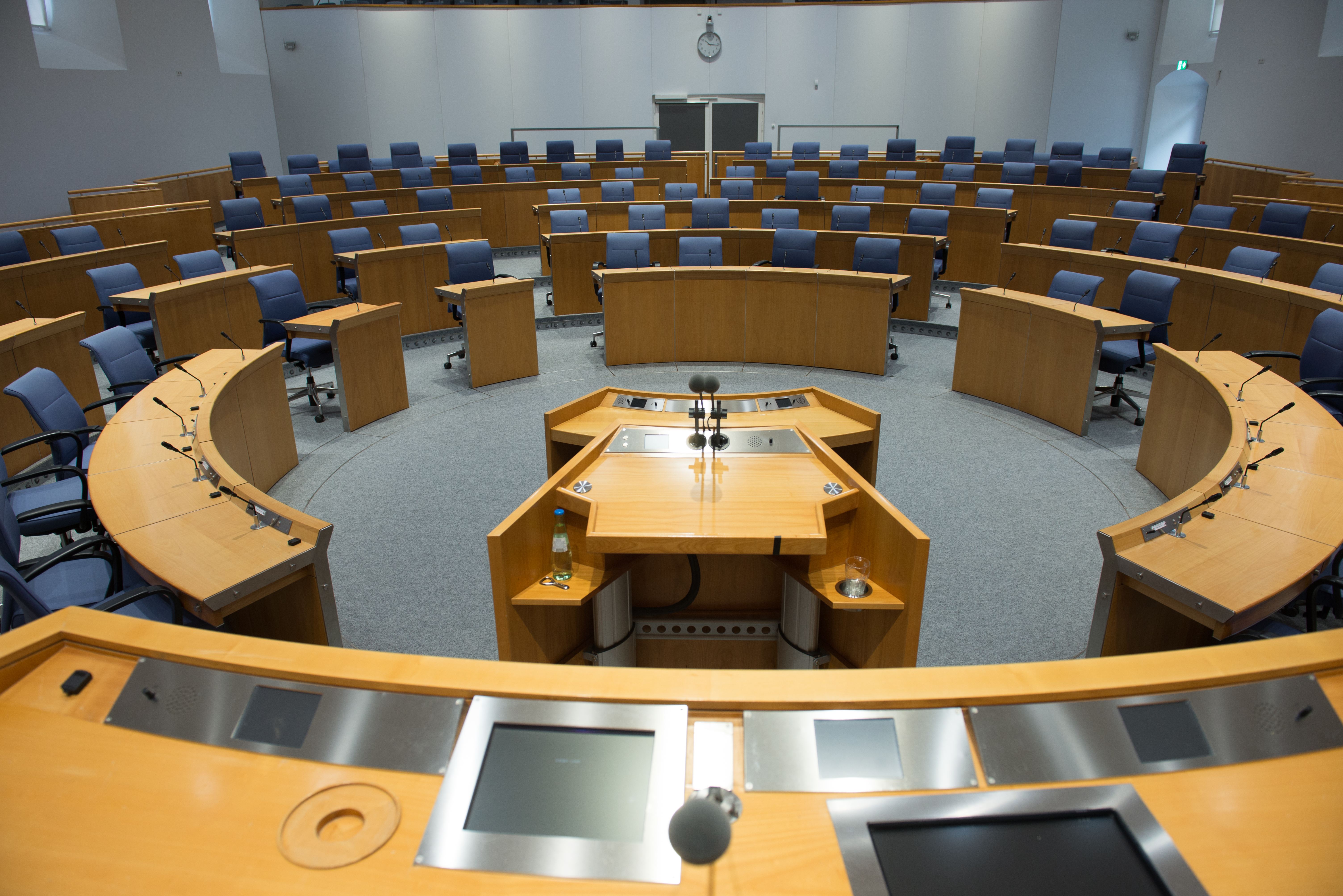 Plenarsaal des Landtages von Rheinland-Pfalz im Steinsaal, Landesmuseum Rheinland-Pfalz